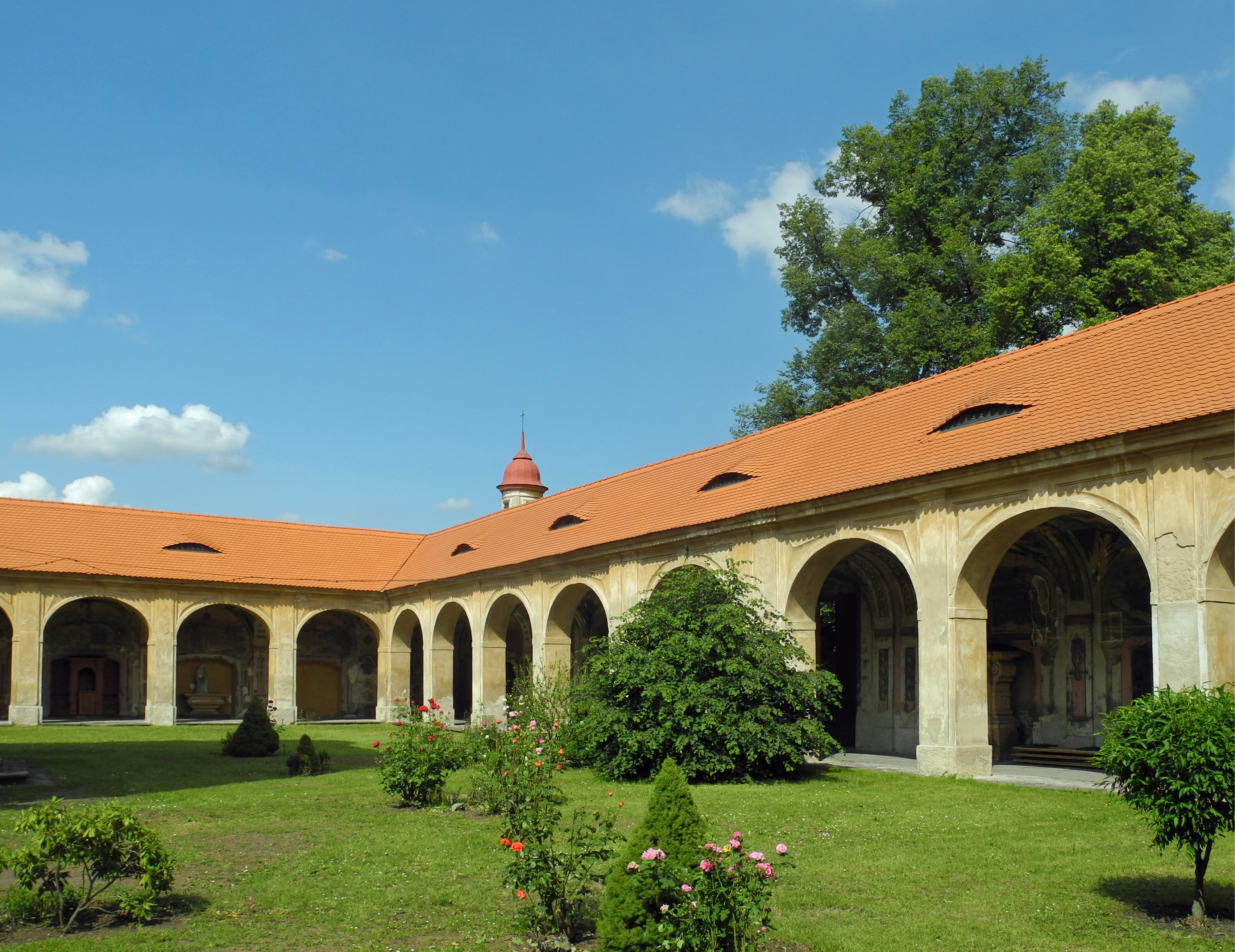 Kreuzgang der Wallfahrtskirche der schmerzhaften Mutter Gottes in Maria Ratschitz (Mariánské Radčice)